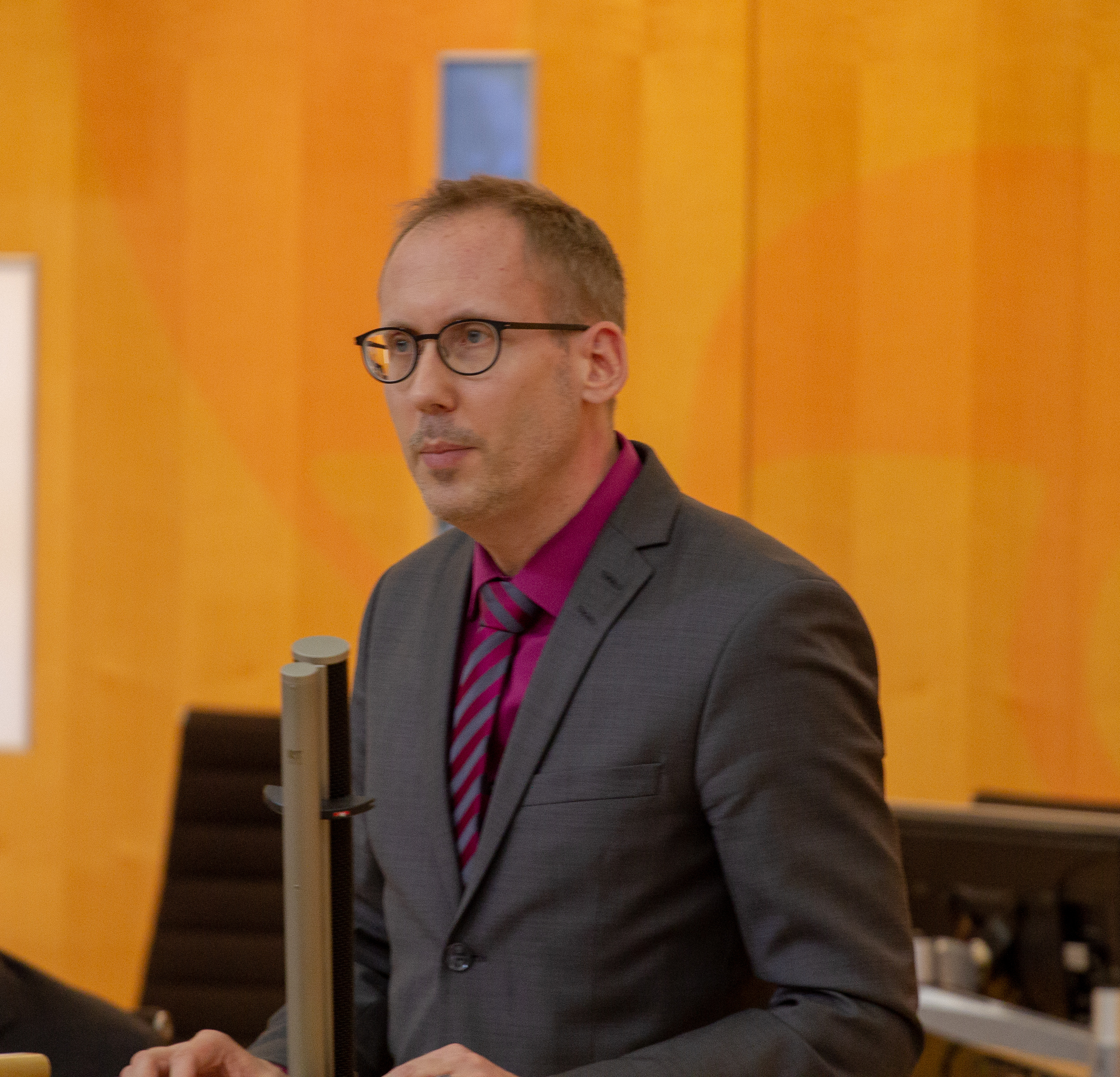 Kai Klose im Hessischen Landtag